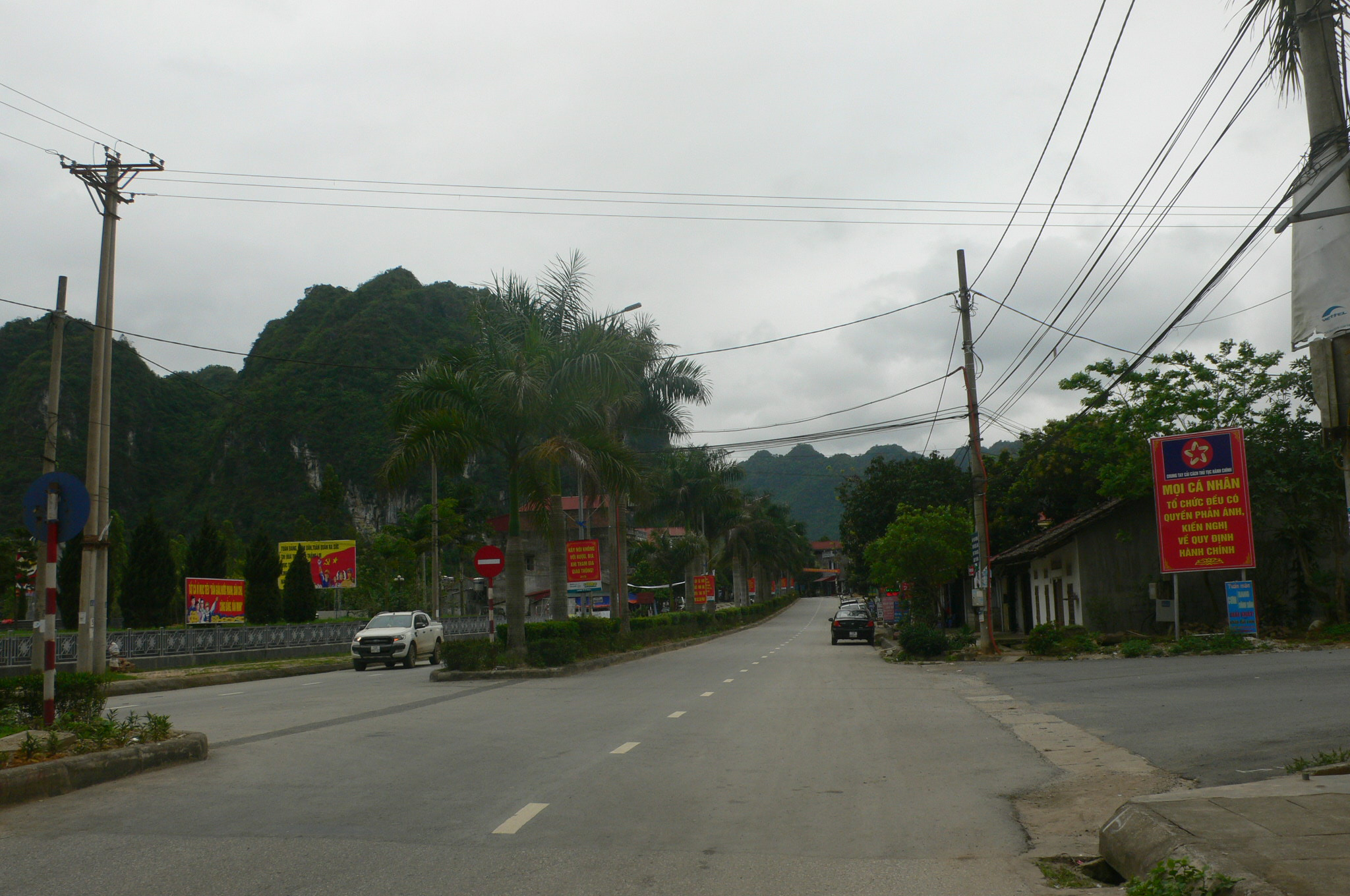 Thị trấn Tu Đồn, huyện Văn Quan, tỉnh Lạng Sơn